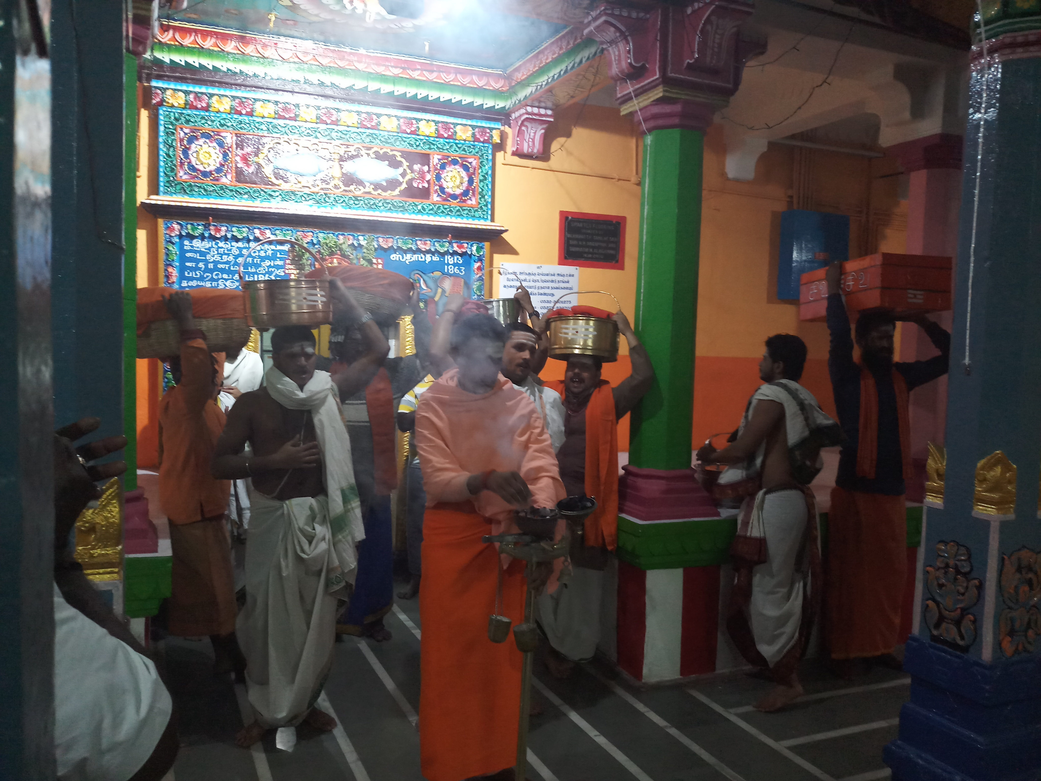 வாரணாசியில் உள்ள ஸ்ரீ காசி நாட்டுக்கோட்டை நகர சத்திரத்தில் இருந்து ஸ்ரீ காசி விஸ்வநாதர் கோயிலுக்கு கொண்டு செல்லப்படும் பூஜை பொருட்கள். இது சம்போ என்று அழைக்கப்படுகிறது.